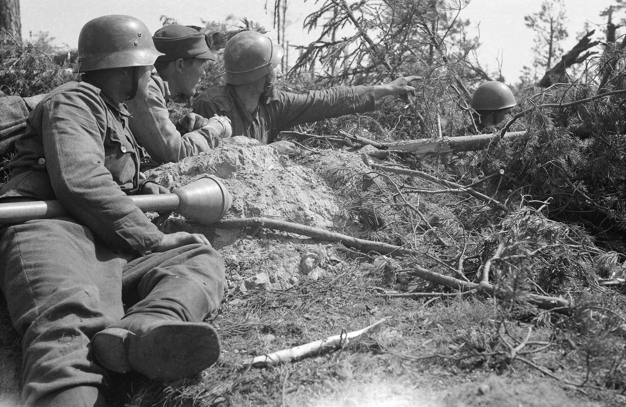 Joukkueenjohtaja on tullut tarkastuskierrokselleen etuasemiin. Kersantti Lohela miestensä luona Ihantalan tienhaaran edustalla. Ihantala, JR 12:n alue 1944.07.11